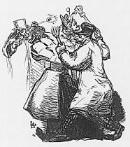 Les balais en papier étaient vendus dans les rues de Paris au moment du Carnaval et servaient à chatouiller les passants et surtout les nuques des passantes. Ils furent interdits comme les plumes de paon par la Préfecture de police.